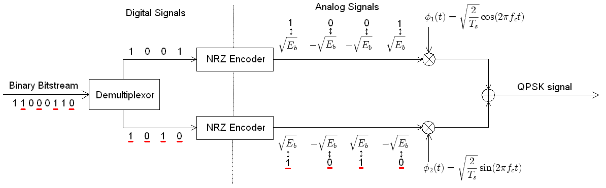 Transmitter QPSK